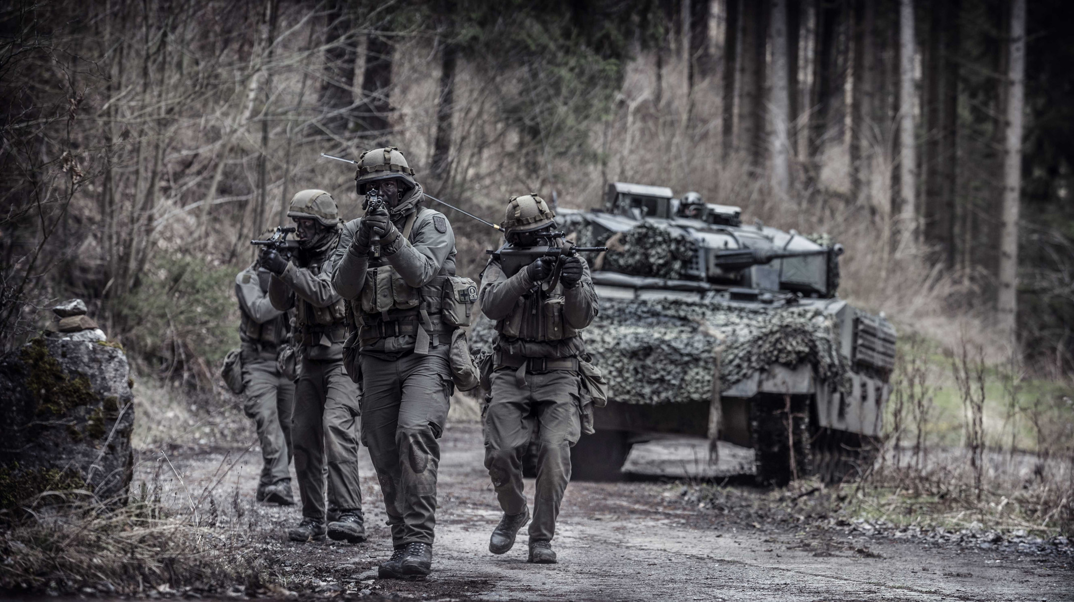 Panzergrenadiere im Vorgehen.